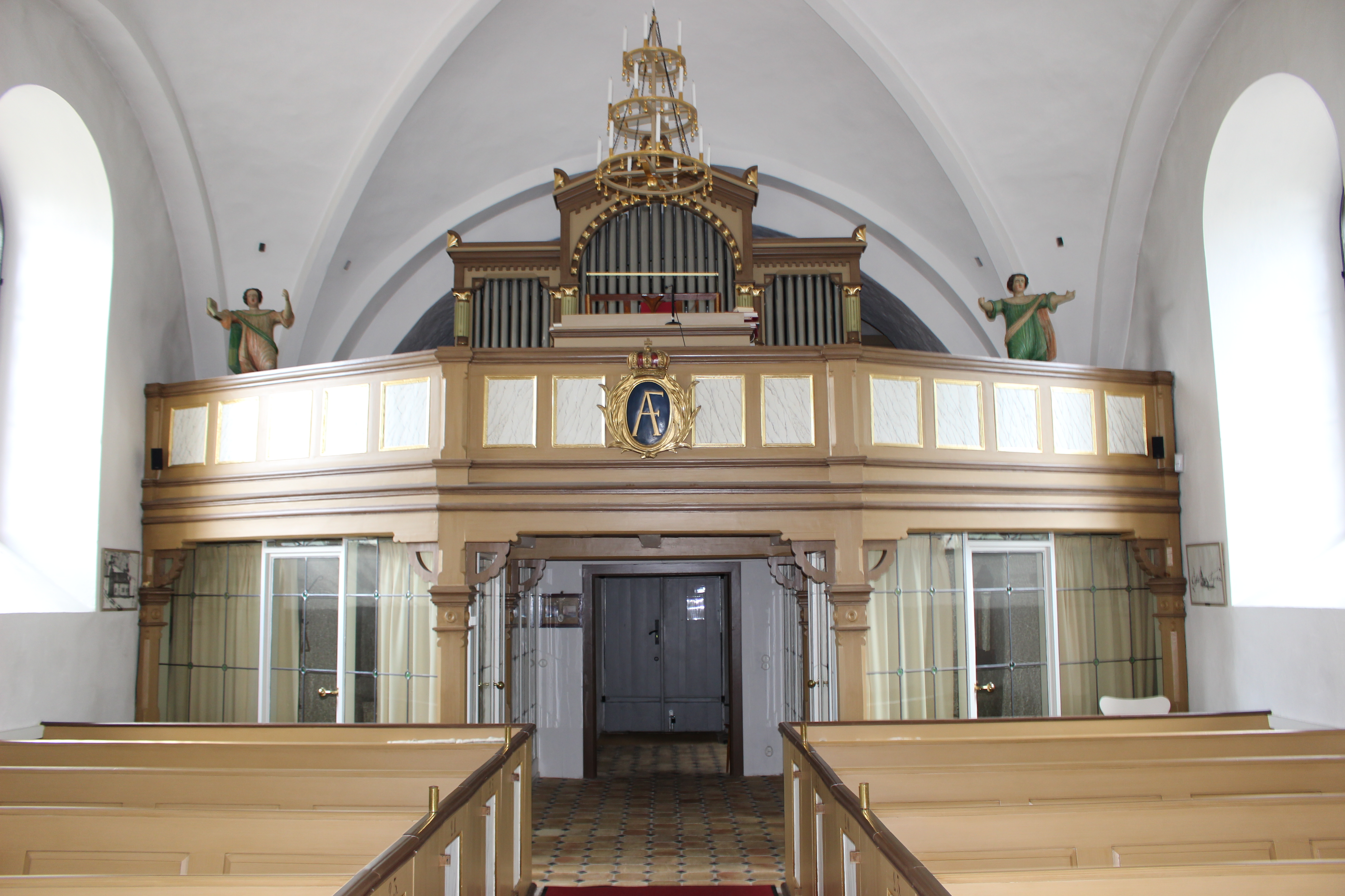 Orgel och orgelläktare i Össjö kyrka